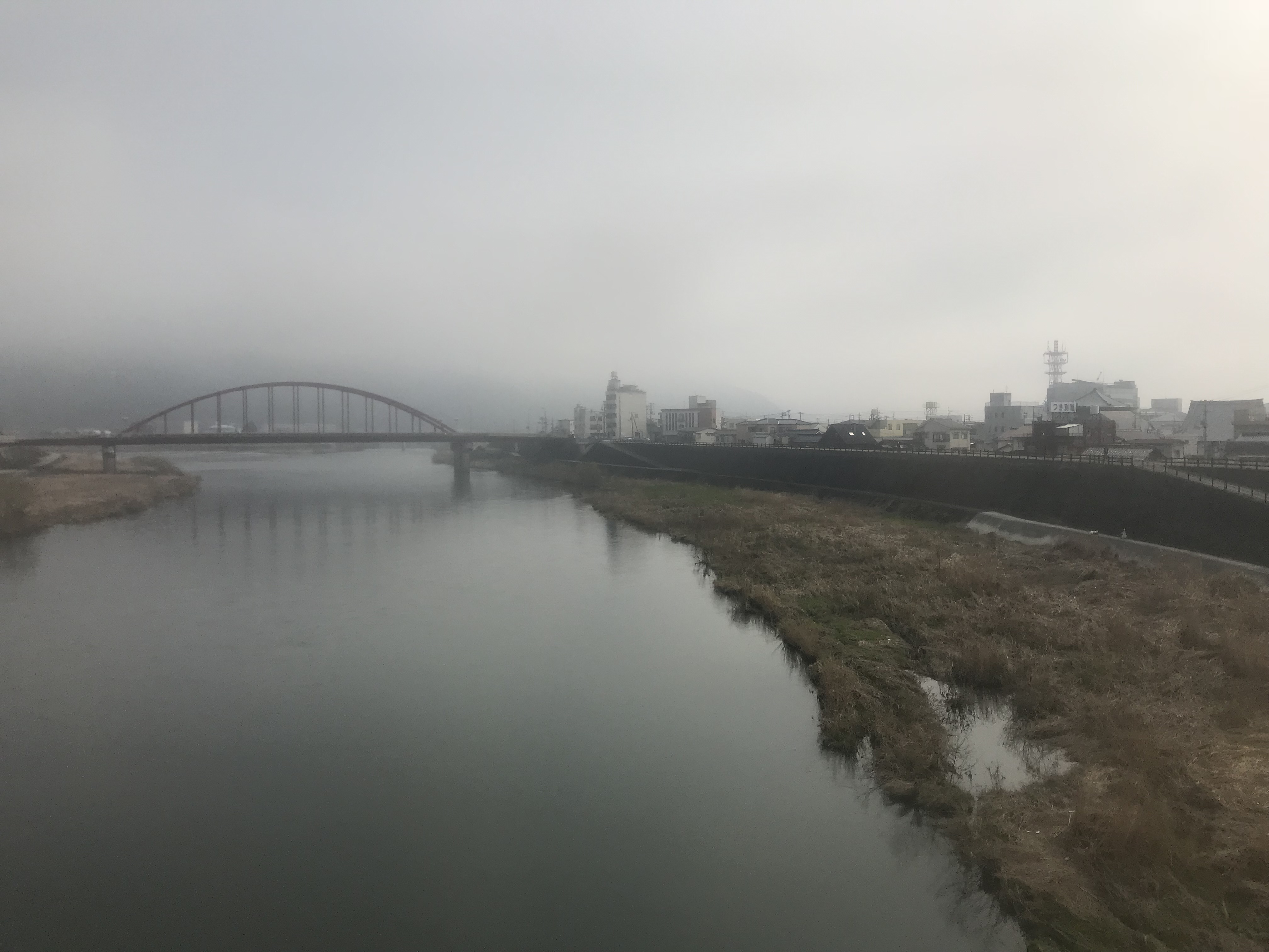 尾関山-三次間の橋梁を走る三江線列車内から望む馬洗川に架かる巴橋と三次市街地